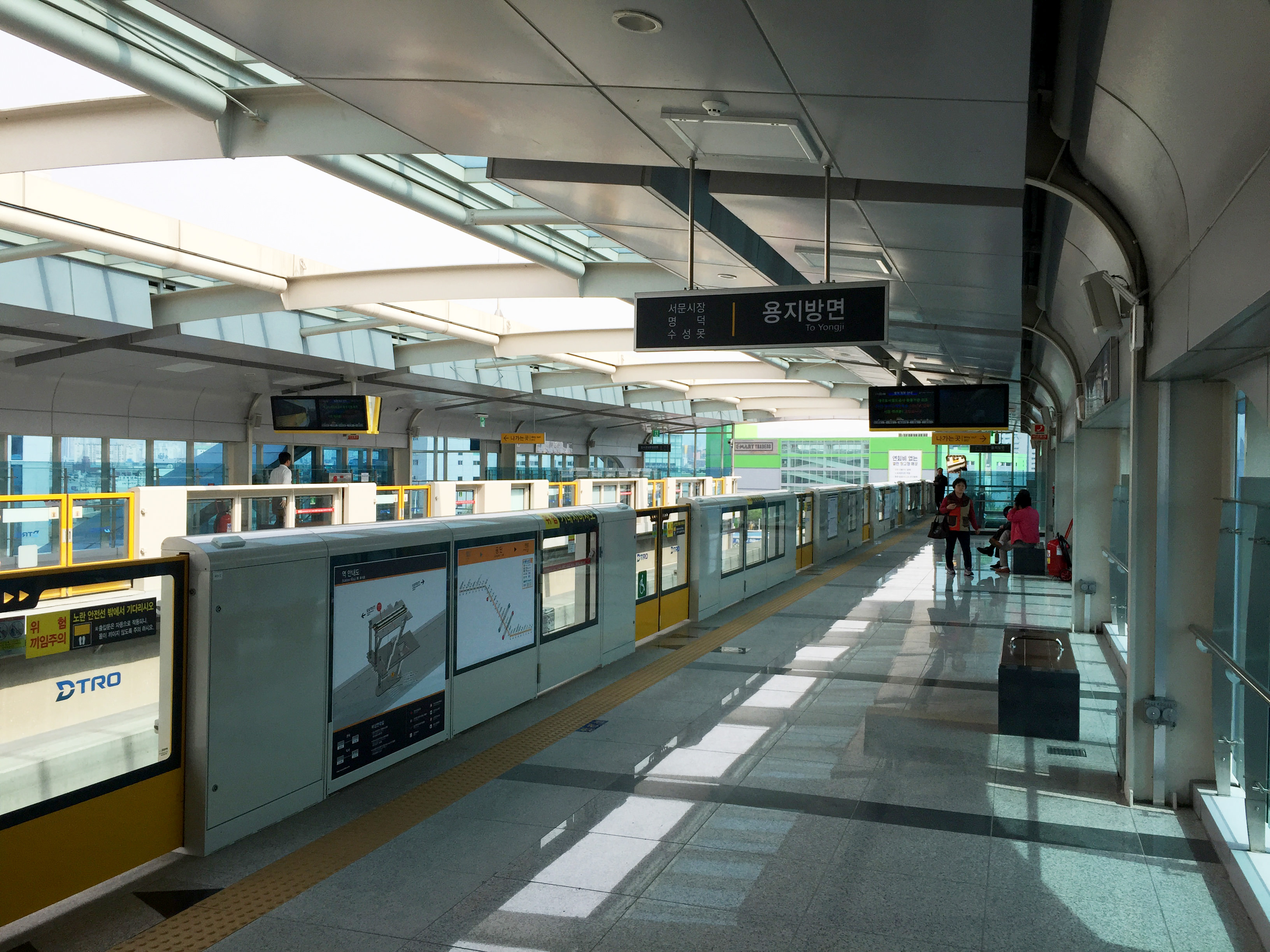 공단역 승강장